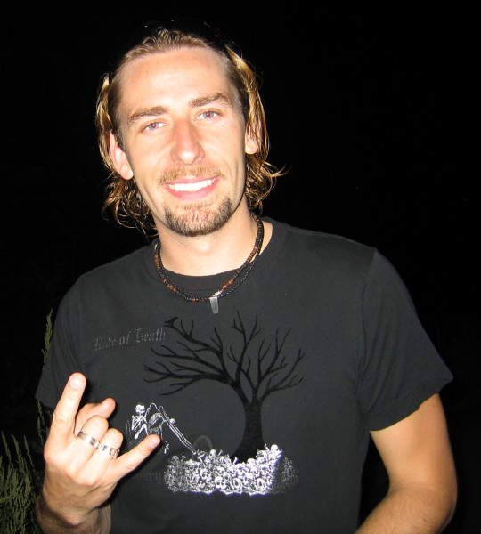 Sänger Chad Kroeger vor dem Stuttgarter Longhorn nach einem Nickelback-Konzert im September 2005